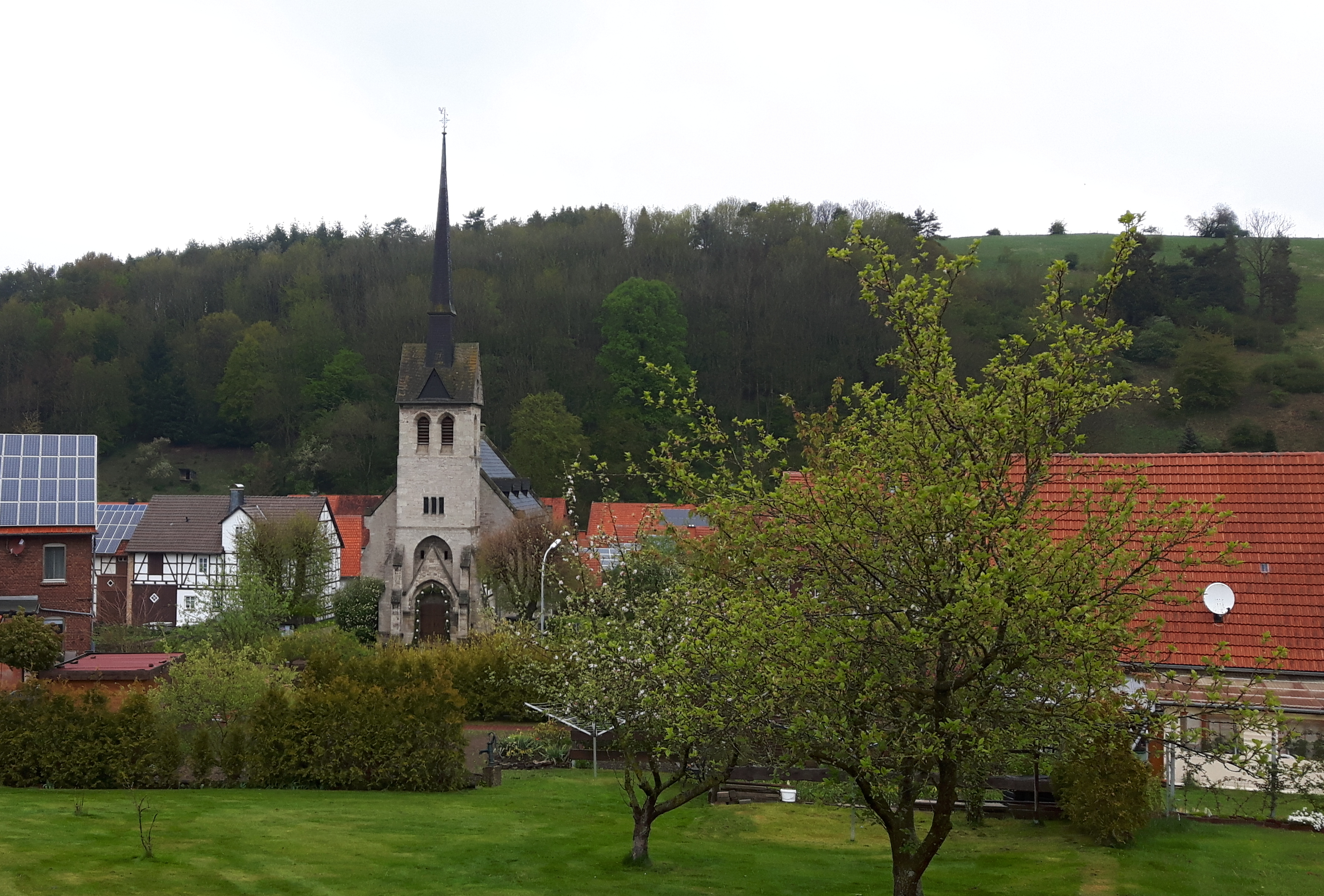 Wirmighausen, Gemeinde Diemelsee (Germany)